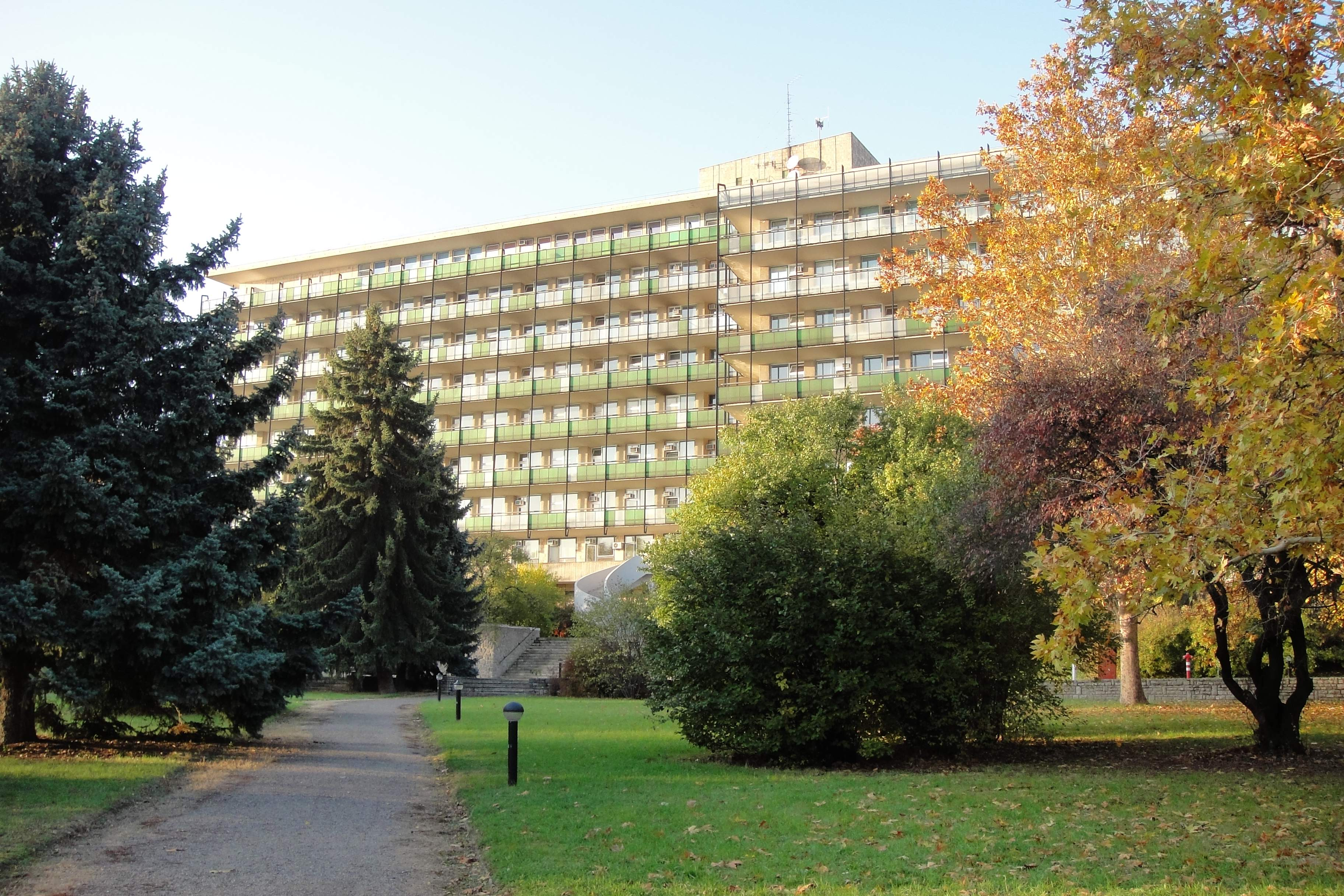 Hauptgebäude der Uniklinik Pécs, die 400 Bettenklinik